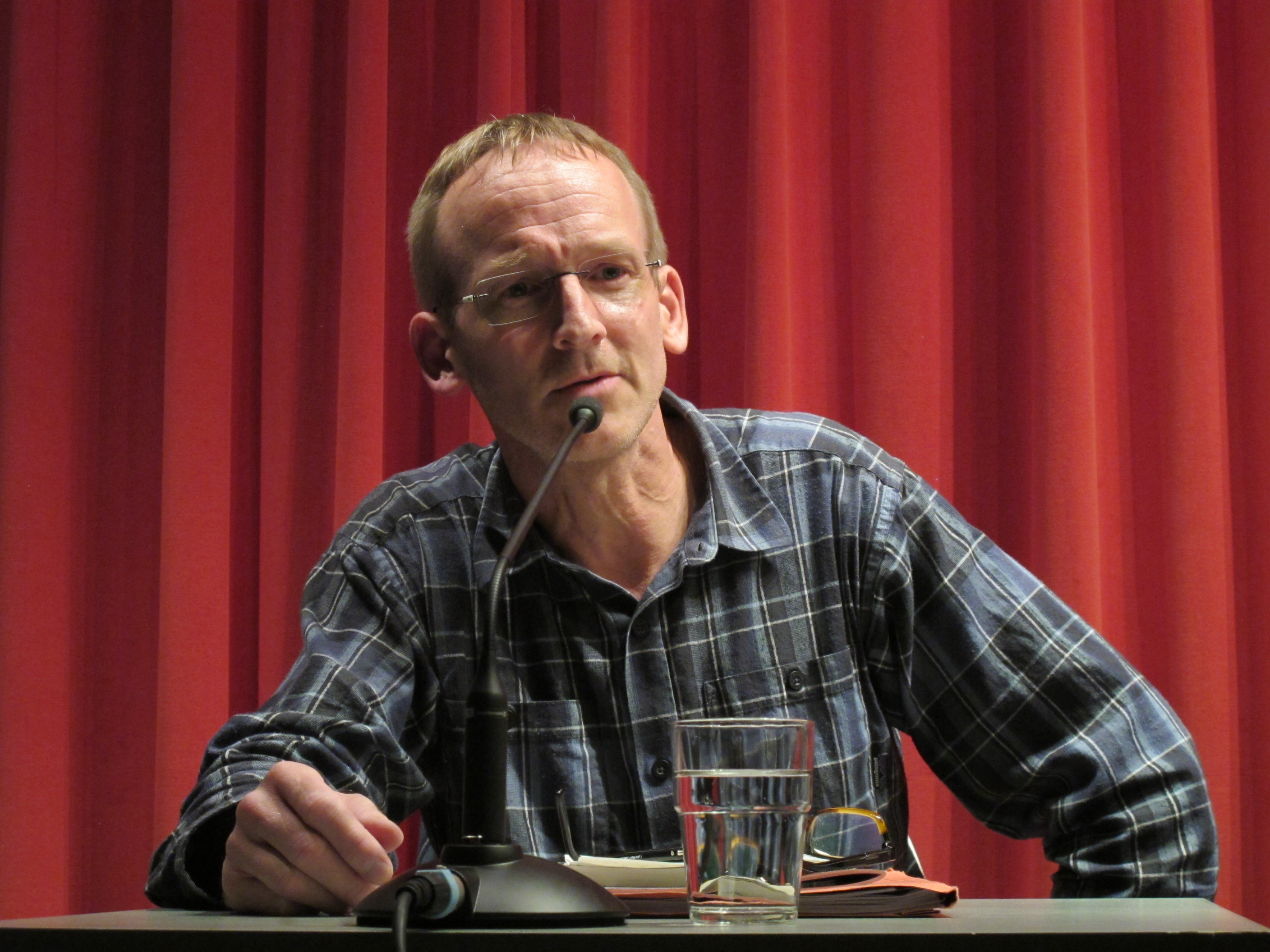 Wolfgang Berends bei der Präsentation von Außer.dem Nr 21 im Lyrikkabinett